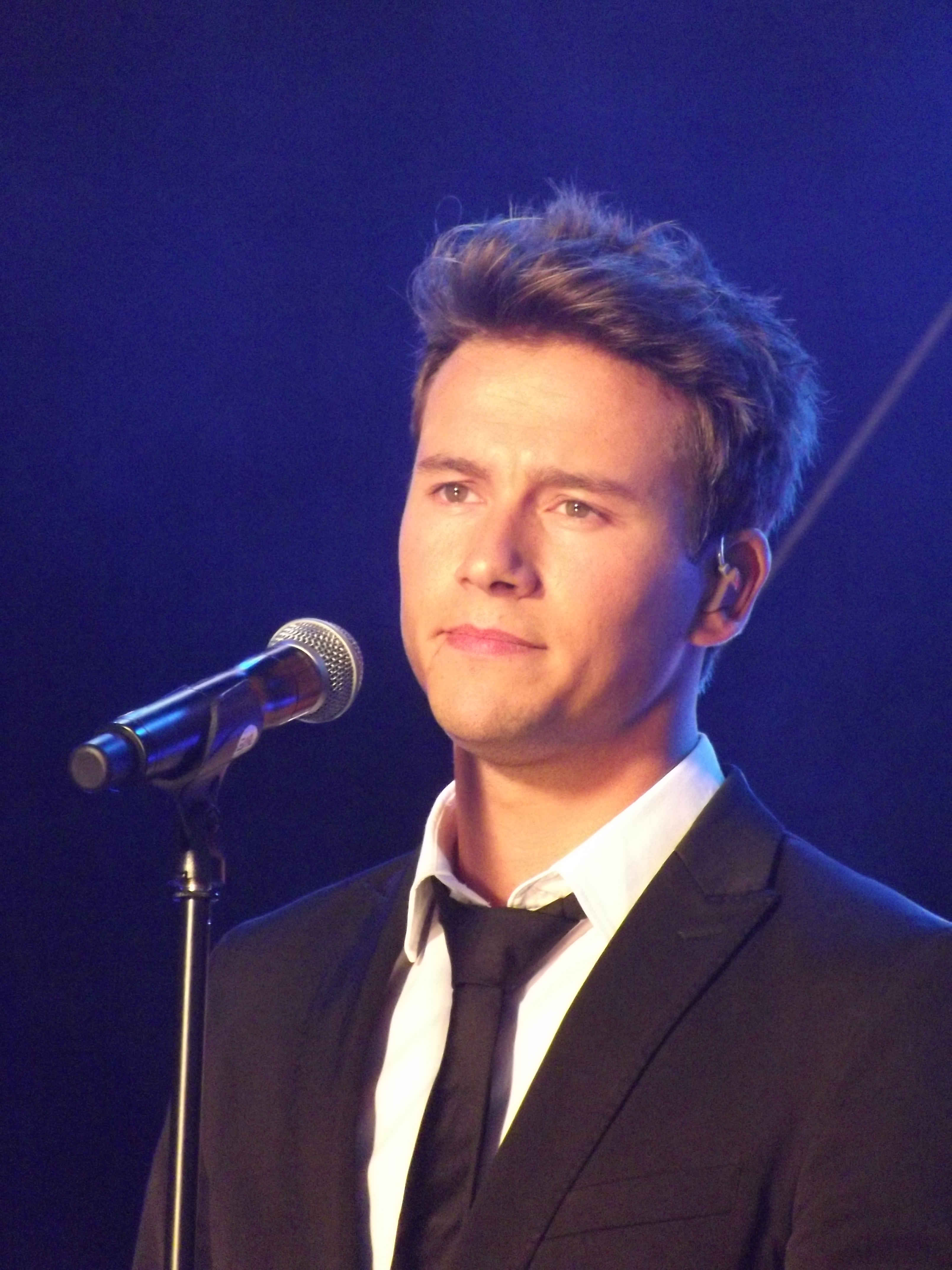 Yannick Bovy tijdens de uitreiking van de Radio 2 Zomerhit-award op 17 augustus 2012 in Middelkerke-Westende